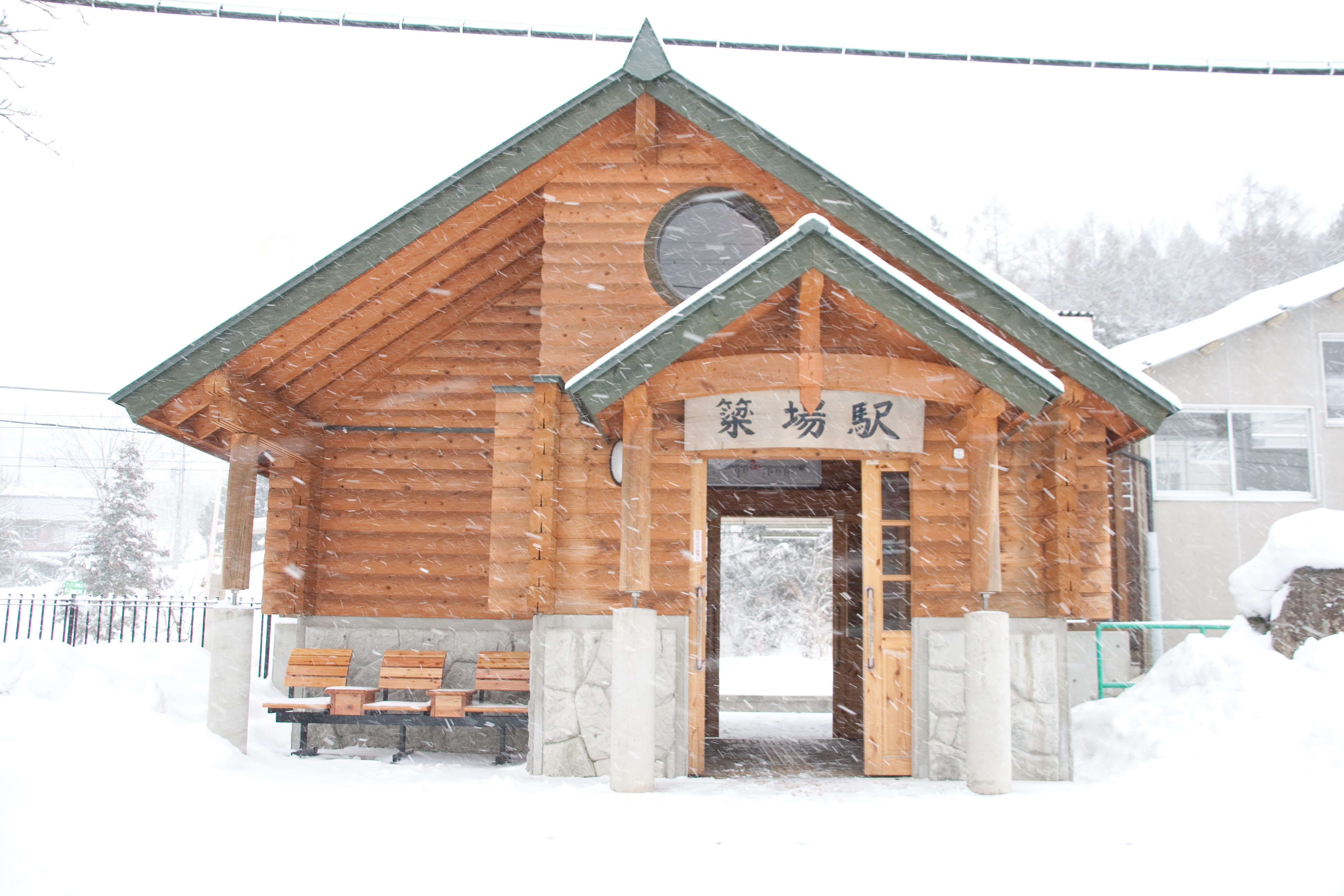 JR大糸線簗場駅の駅舎外観